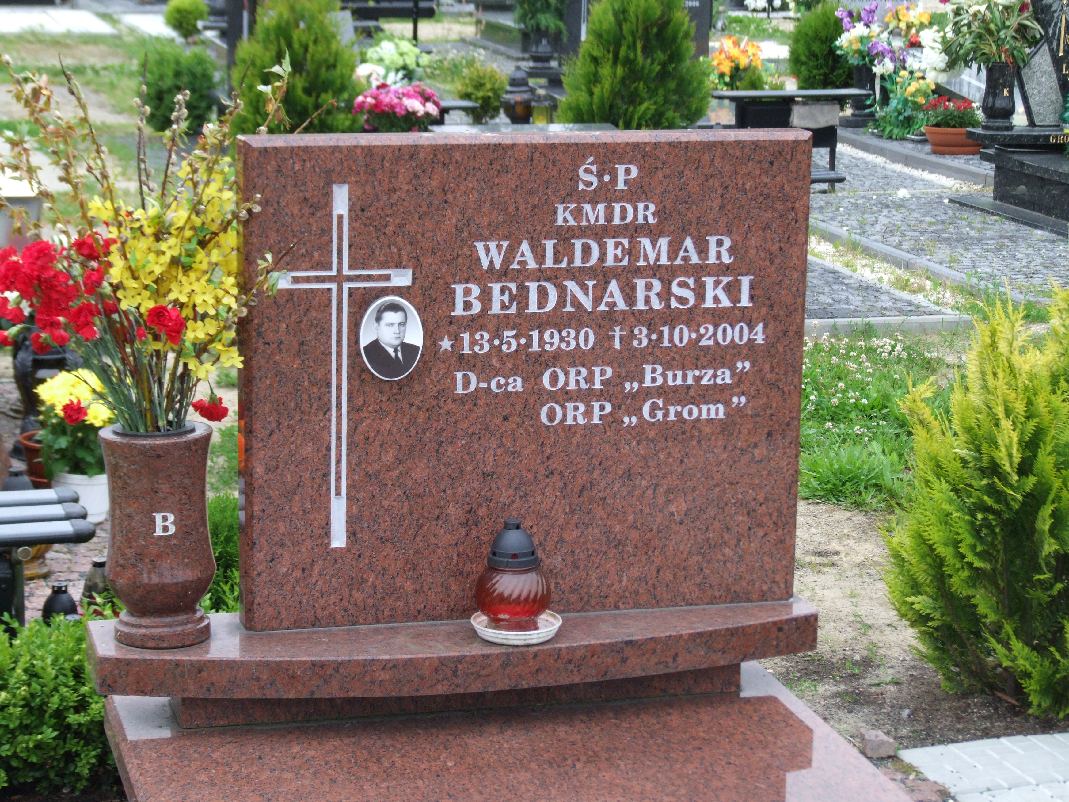 Gdynia-Oksywie Cmentarz Marynarki Wojennej